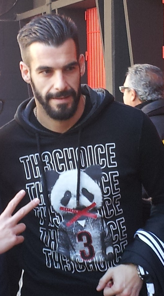 Abans del partit contra el Sevilla.